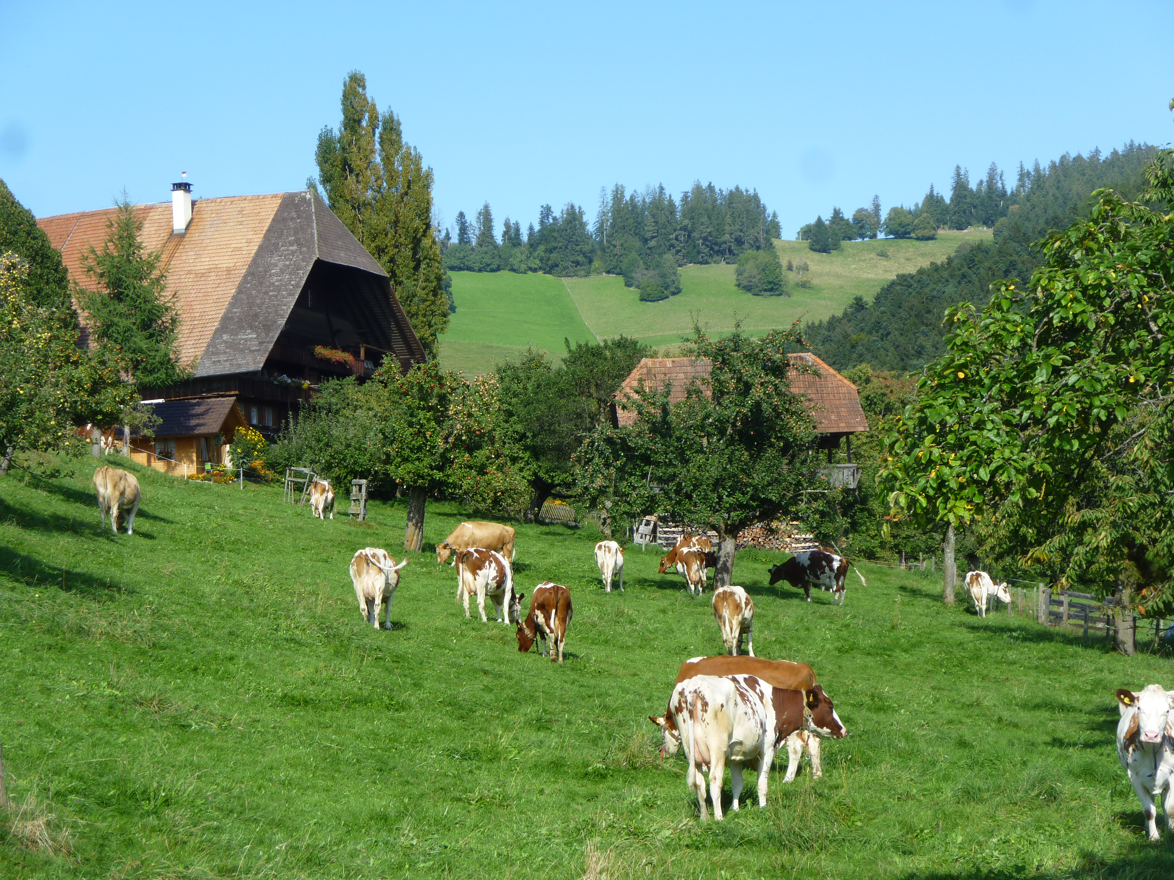 Statthalterhof Oberbleiken. Bernischer Bauernhof